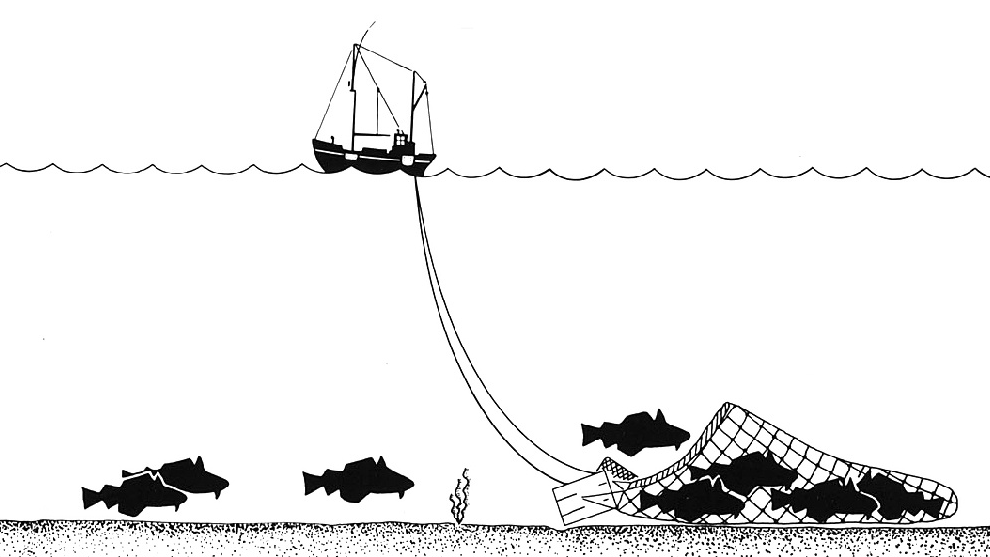 Трал рыболовный, кадрирование оригинального рисунка